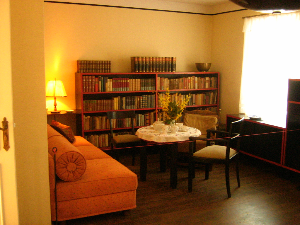 Der gemütliche Teil des Arbeitszimmers Hans Falladas in seinem Wohnhaus in Carwitz (heute Gemeinde Feldberger Seenlandschaft) in Mecklenburg.